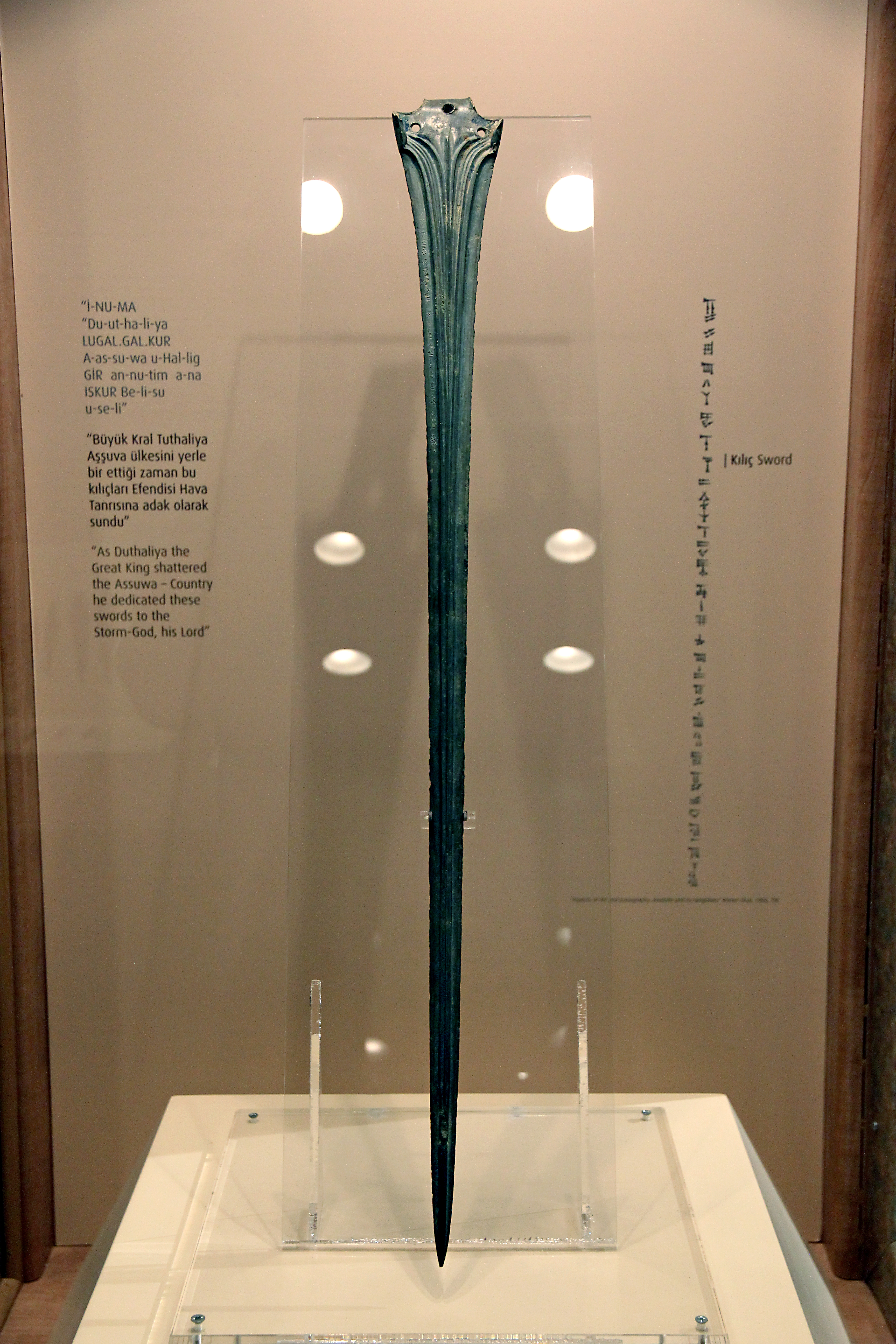 Archäologisches Museum Çorum, Zentraltürkei, Schwert Tudḫaliyas IV. mit Keilschrift aus Hattuša